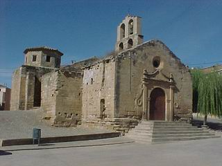 Esglèsia de Sunyer